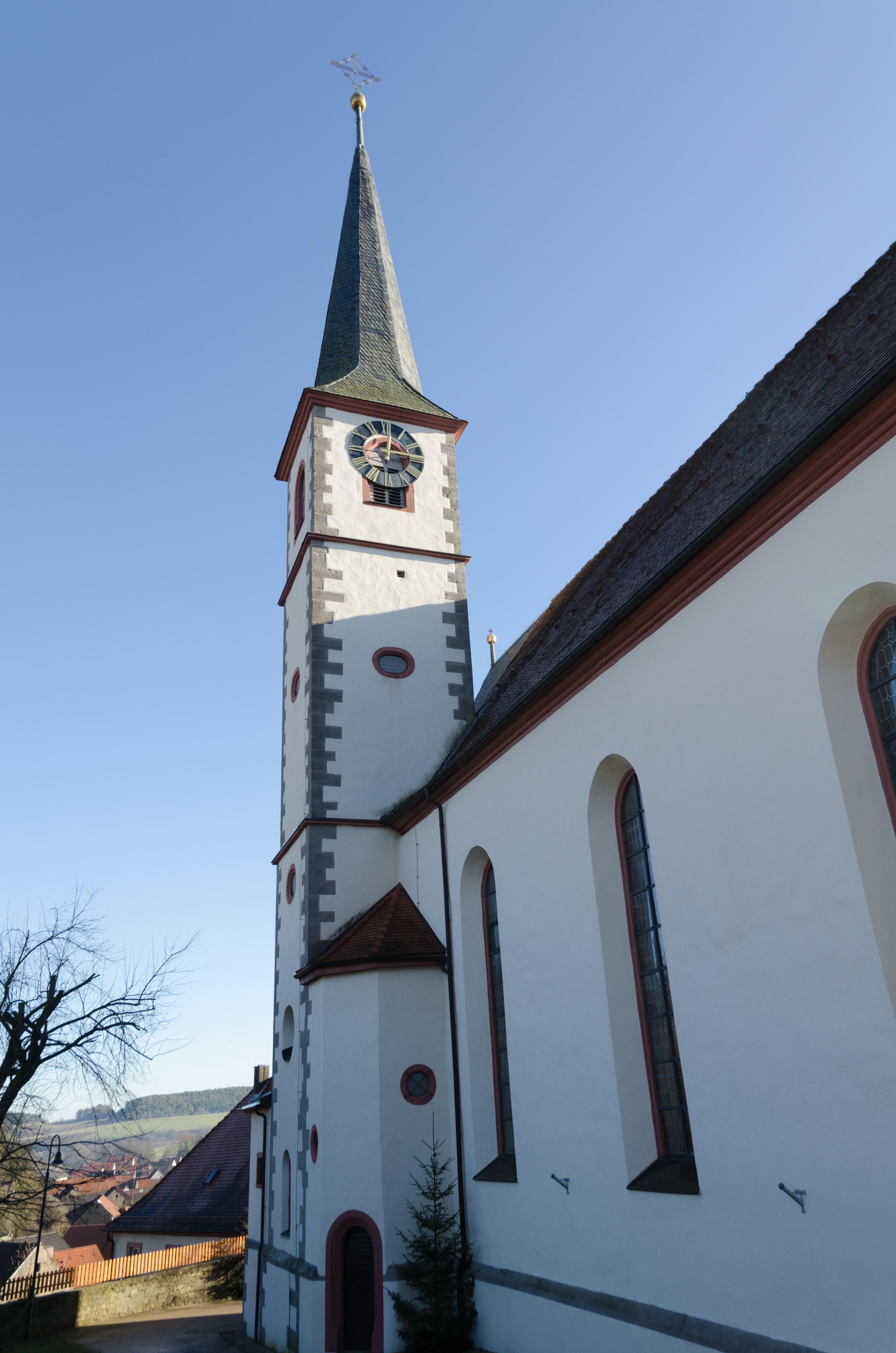 Eußenheim, Aschfeld, Katholische Pfarrkirche St. Bonifatius, außen